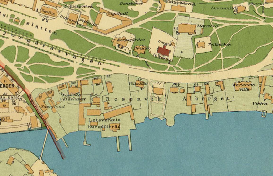 Del av karta över Stockholm med områdena Rosenvik och Alberget på Djurgården.